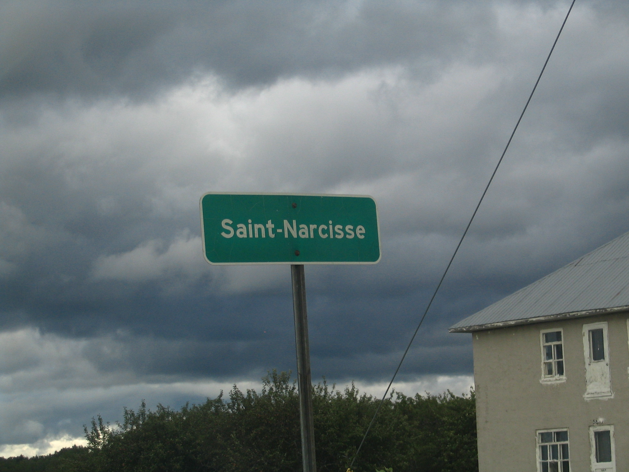 Pancarta de bienvenida a Saint-Narcisse